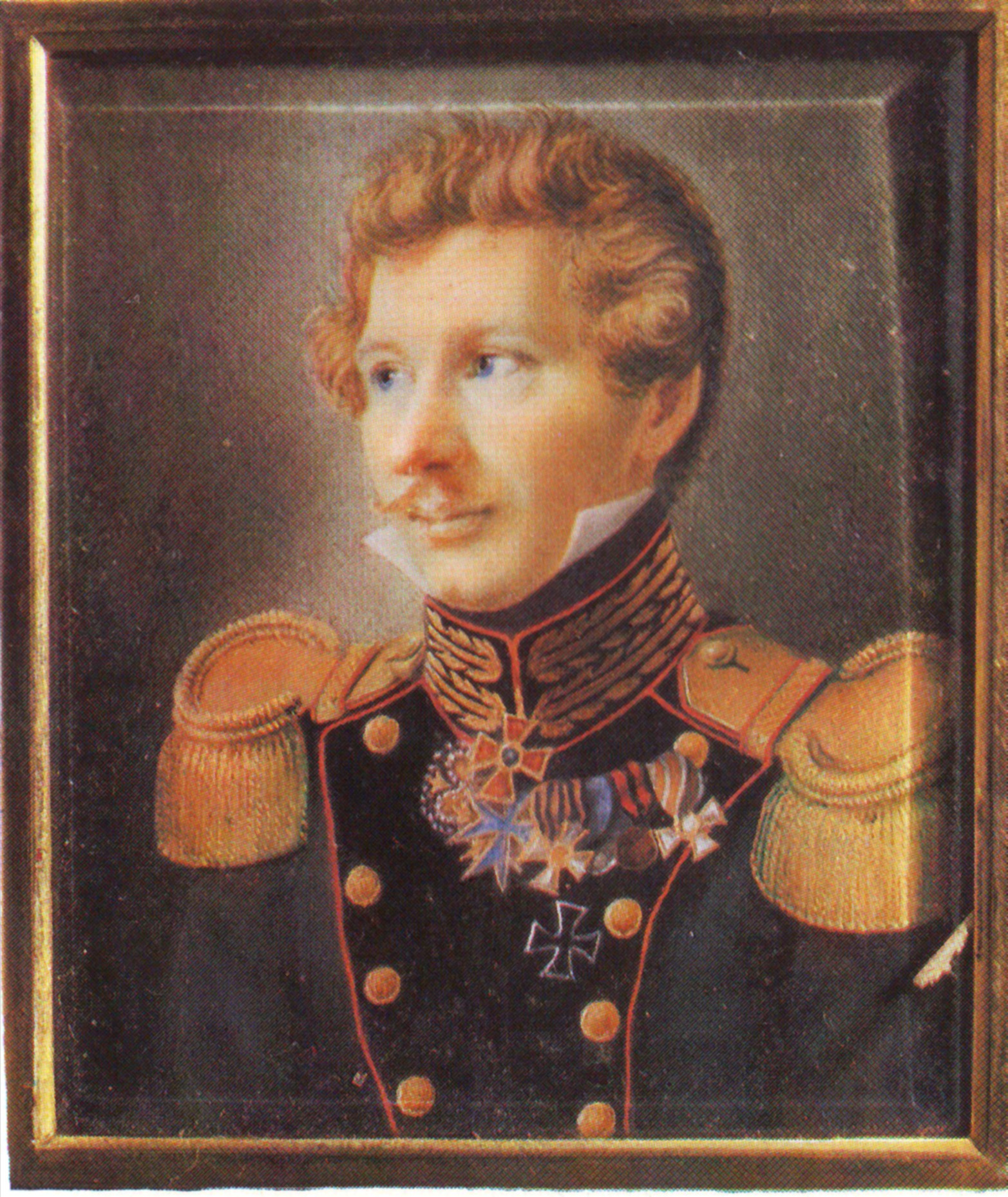 Otto von Bistram (Anton Antonovich), (1789-1854)